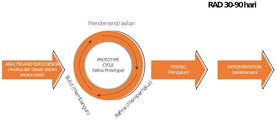 Gambar RAD Modif